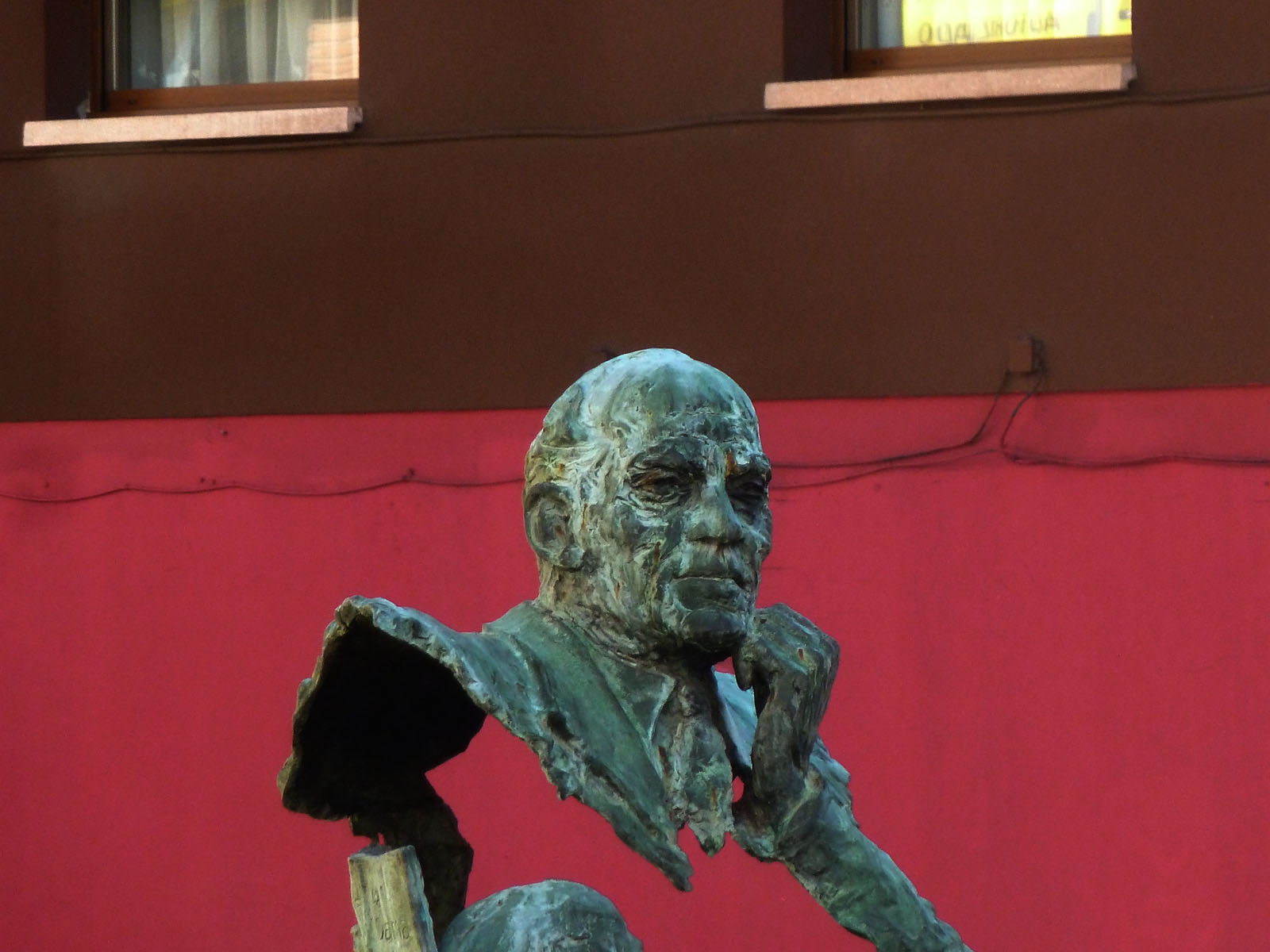 Oviedo